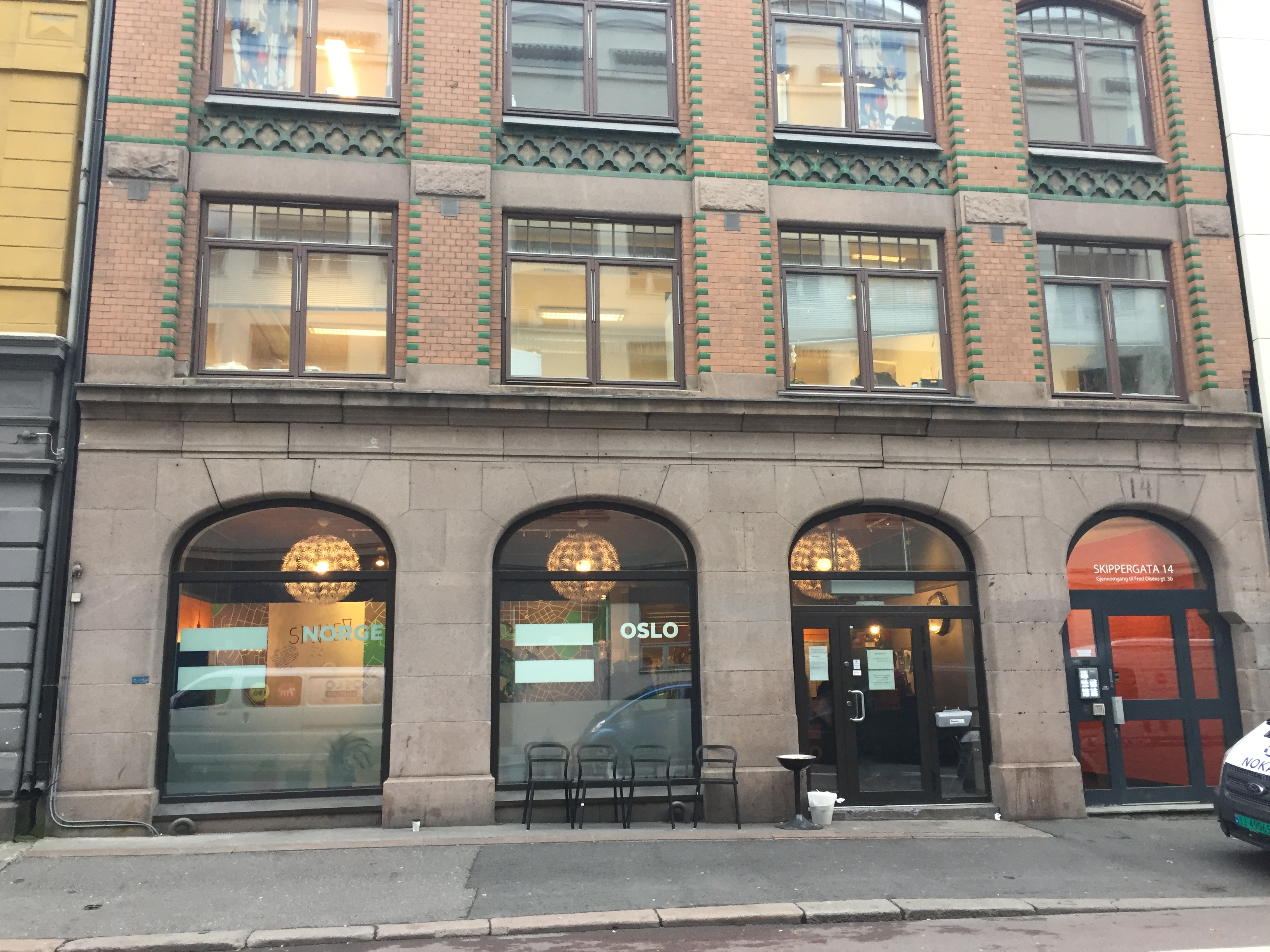 Kontoret til =Oslo / Stiftelsen Erlik i Skippergata i Oslo.